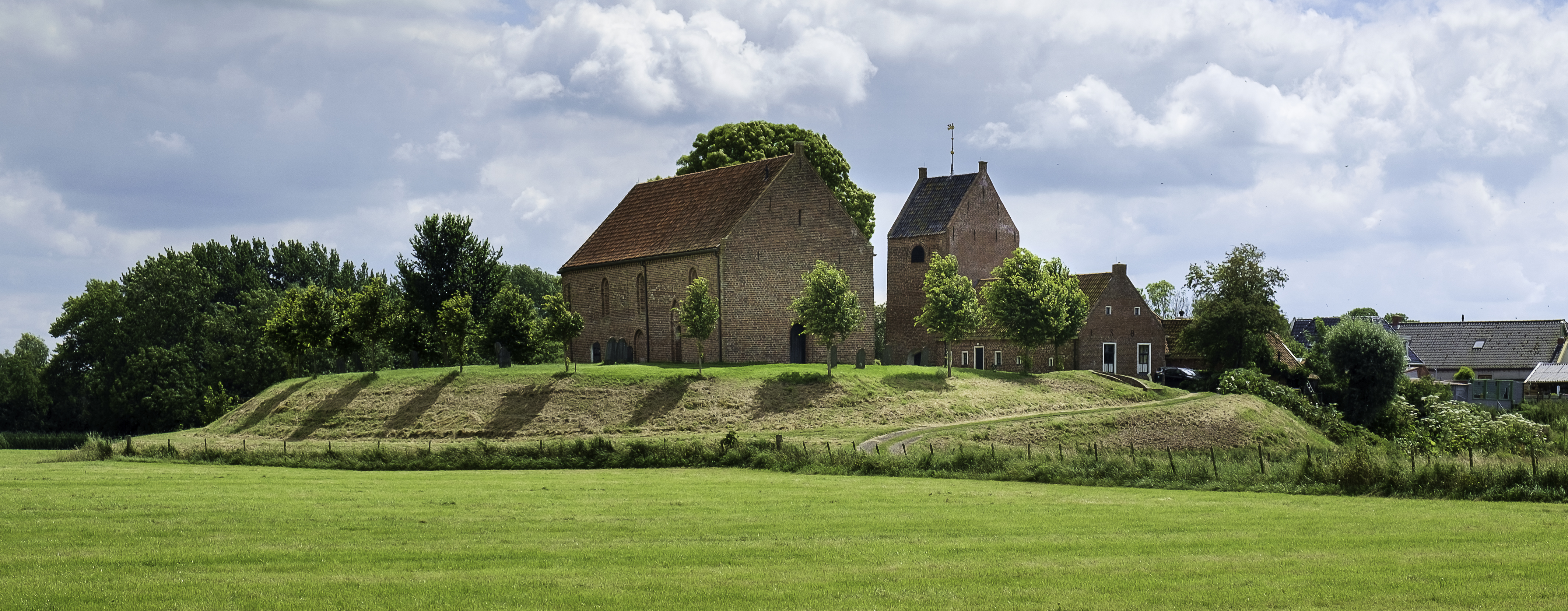 Wierde van Ezinge